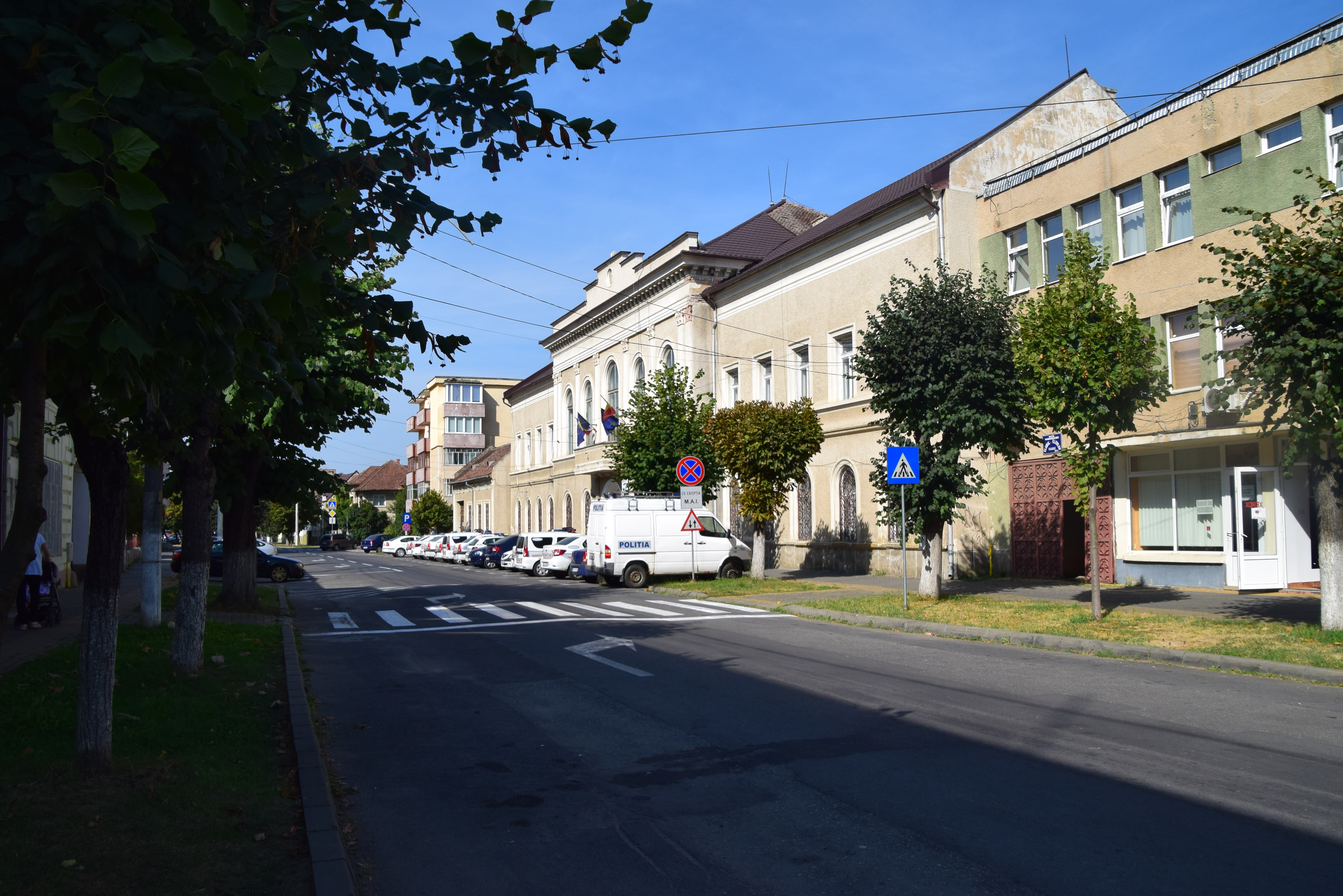 Fosta Prefectură, azi Poliție